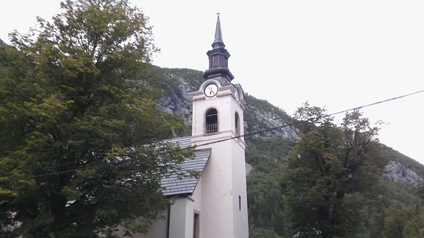 Soča kirche